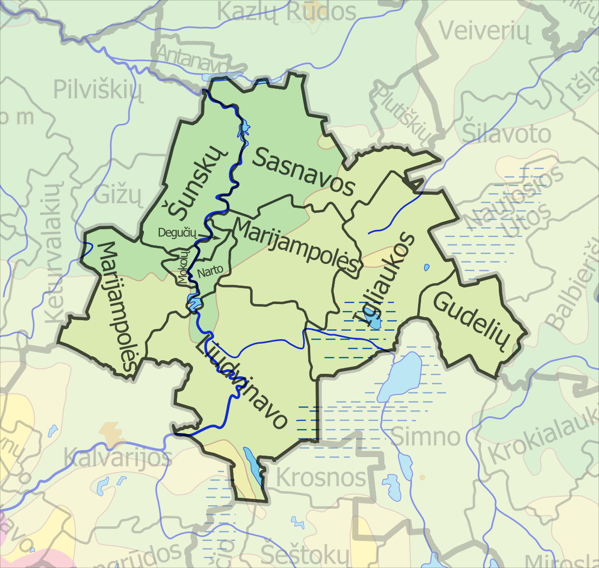 Padaryta iš :image:LietuvosSeniunijos.png